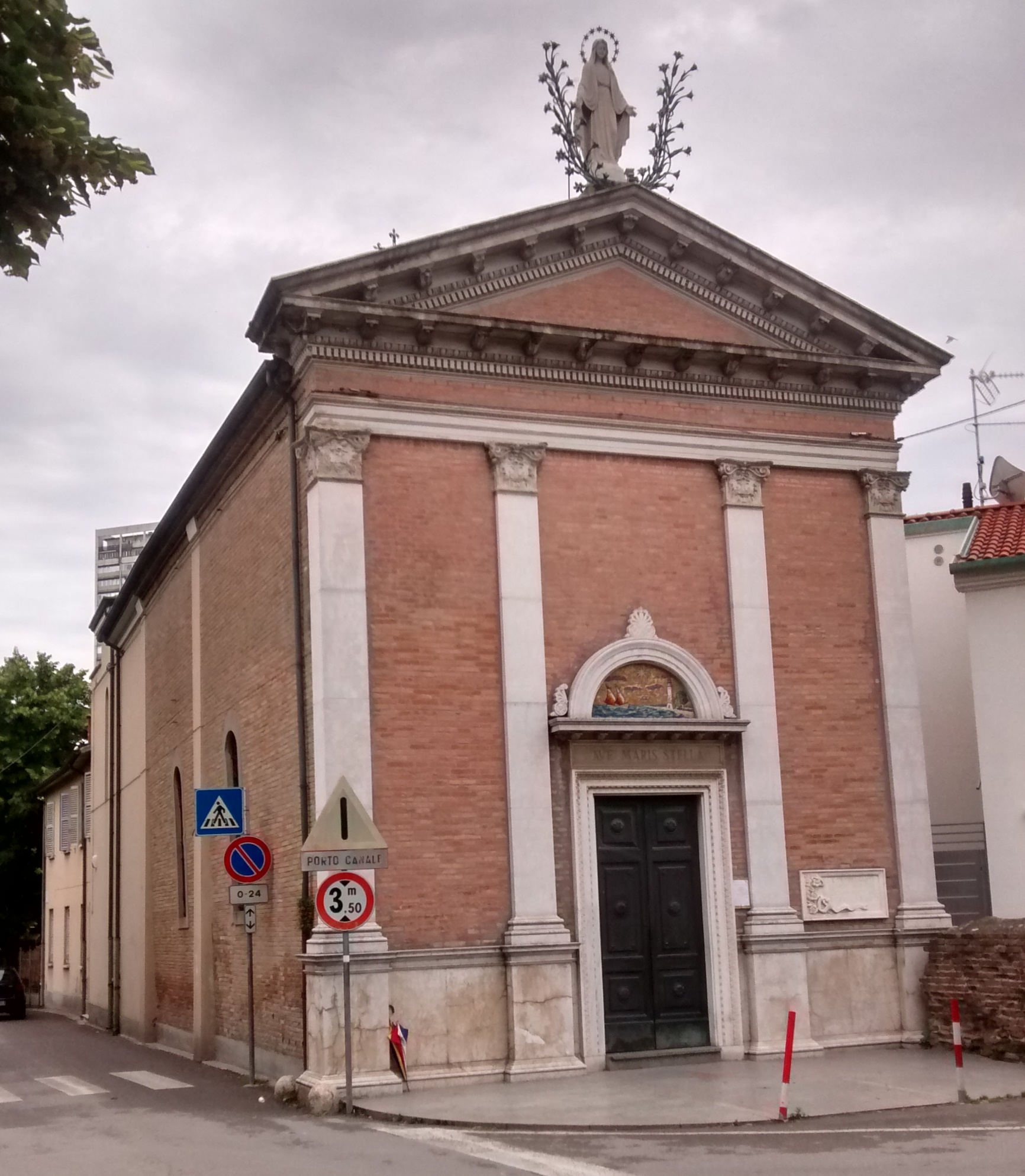 Madonna della Scala, Rimini